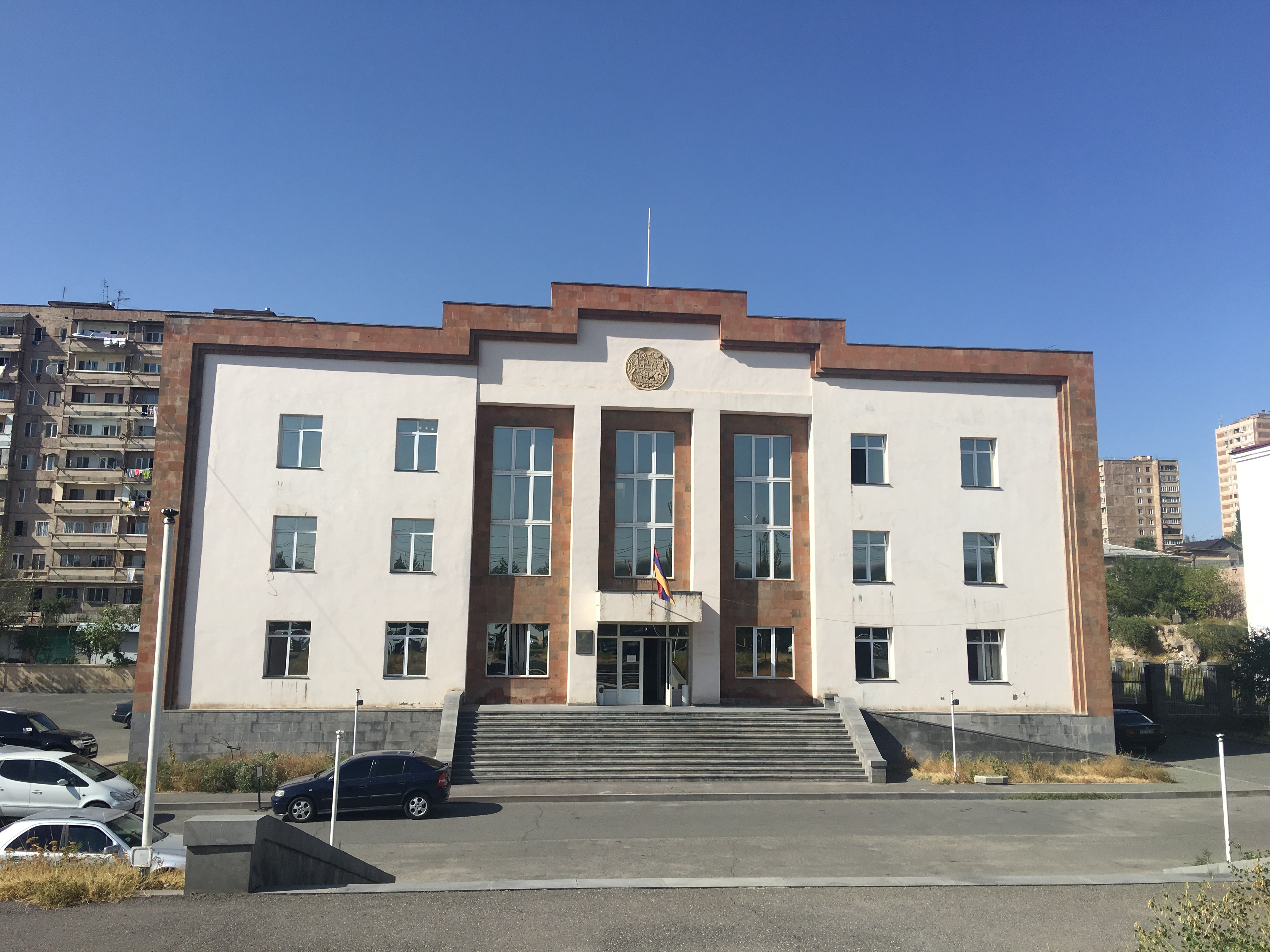 Աջափնյակ և Դավթաշեն վարչական շրջանների ընդհանուր իրավասության դատարան, Երևան, Հայաստան